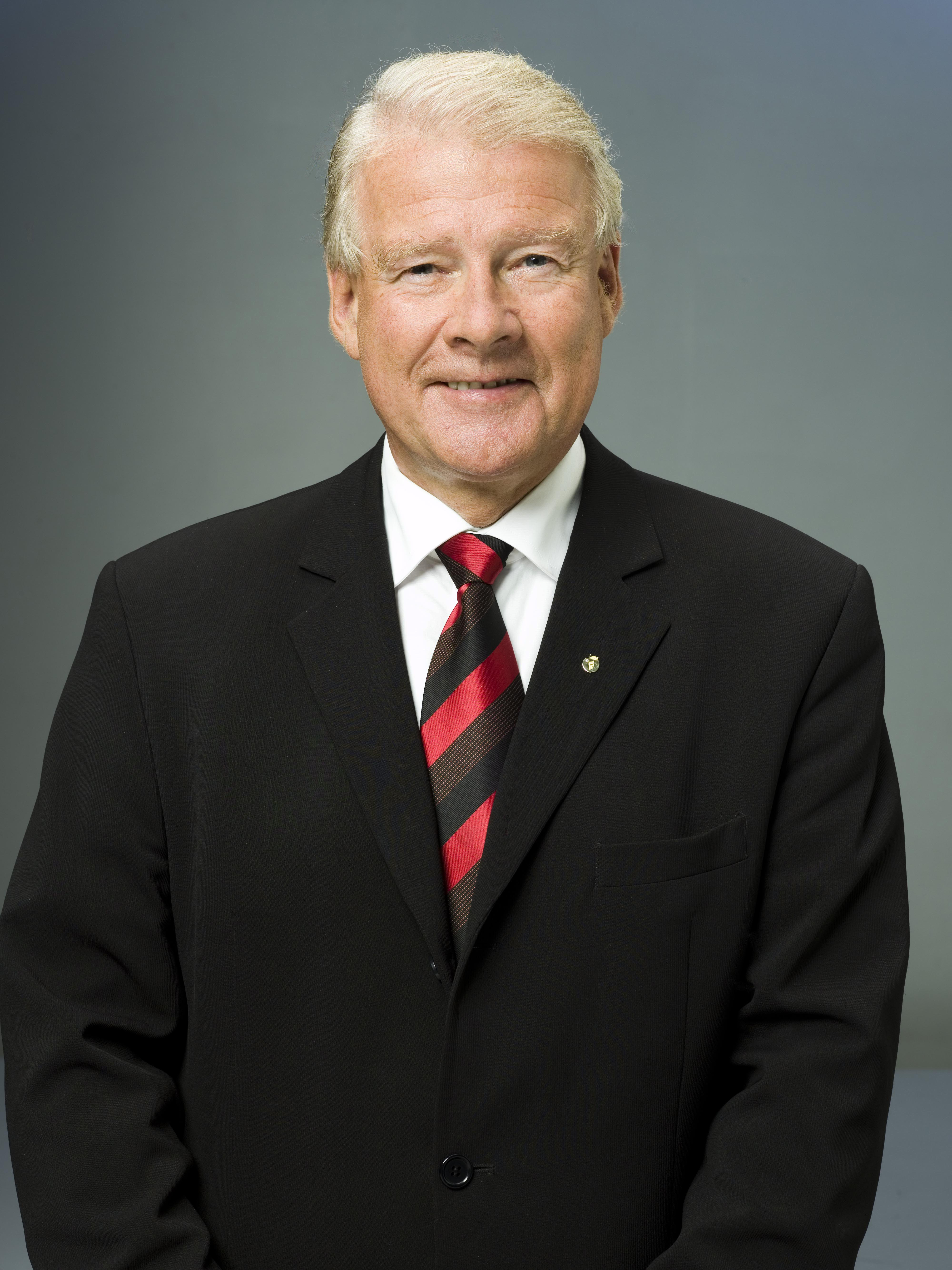 Carl I. Hagen, FrP-politiker